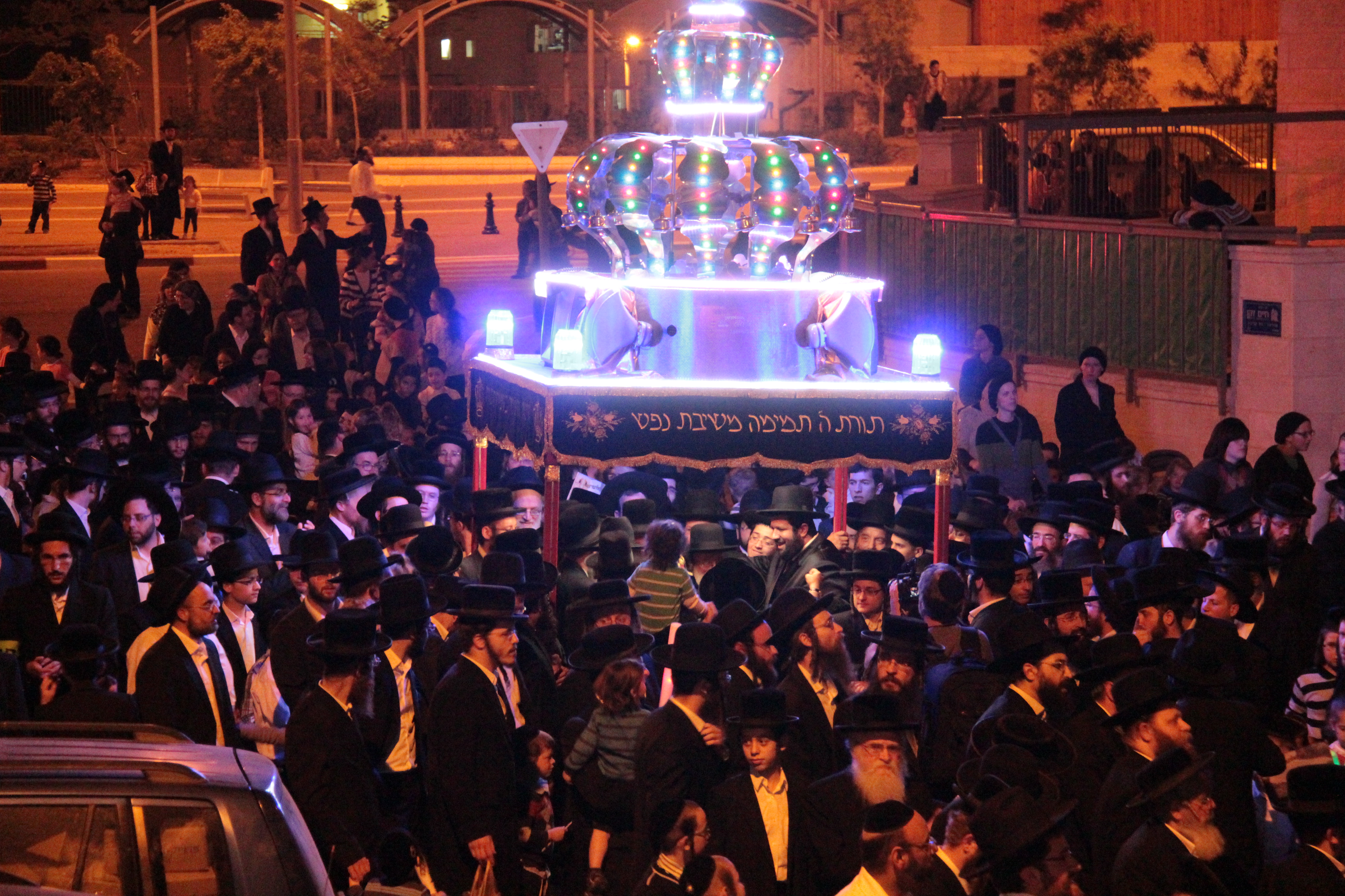 Sefer Torah in memory of Rabbi Shlomo Shtenzel in Beitar Illit Featuring Rabbi Asher Weiss Rabbi yonatan Shtencel